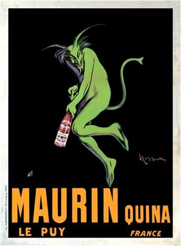 Plakat für "Maurin Quina".